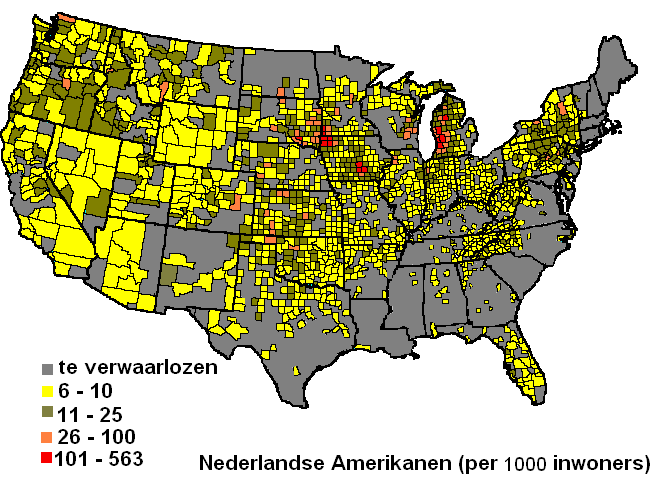 Eigenkaart bron; kaart van Amerikaanse bevolkingsinstituut op de Engelse wikipedia